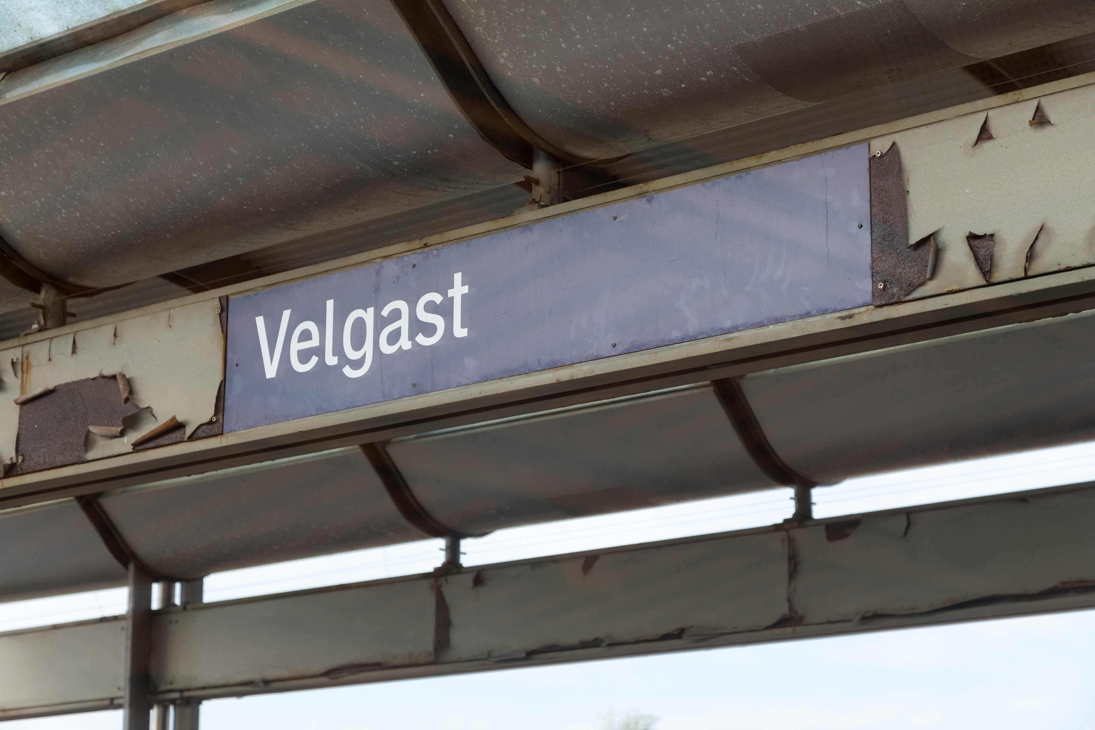 Bahnhof Velgast